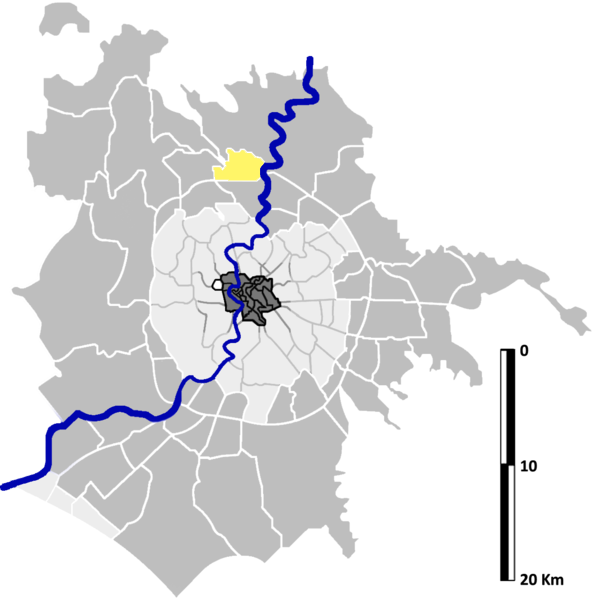 Labaro